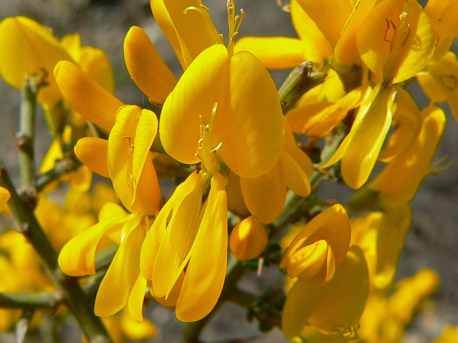 La Lieude, Mérifons, Hérault, FRANCE